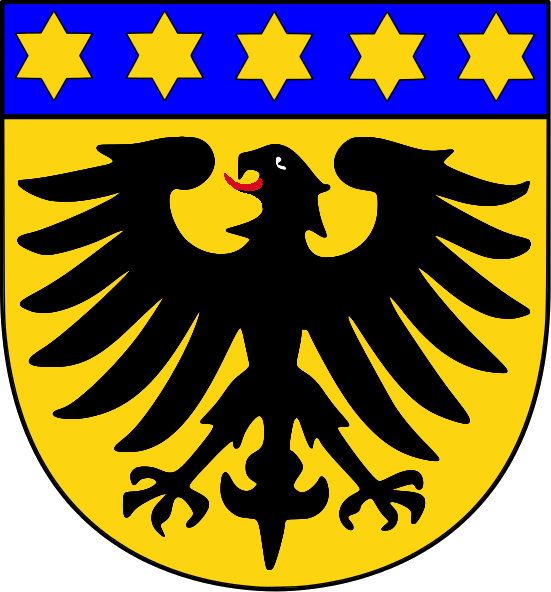 Stadtwappen Markgröningen Adler rotbezungt